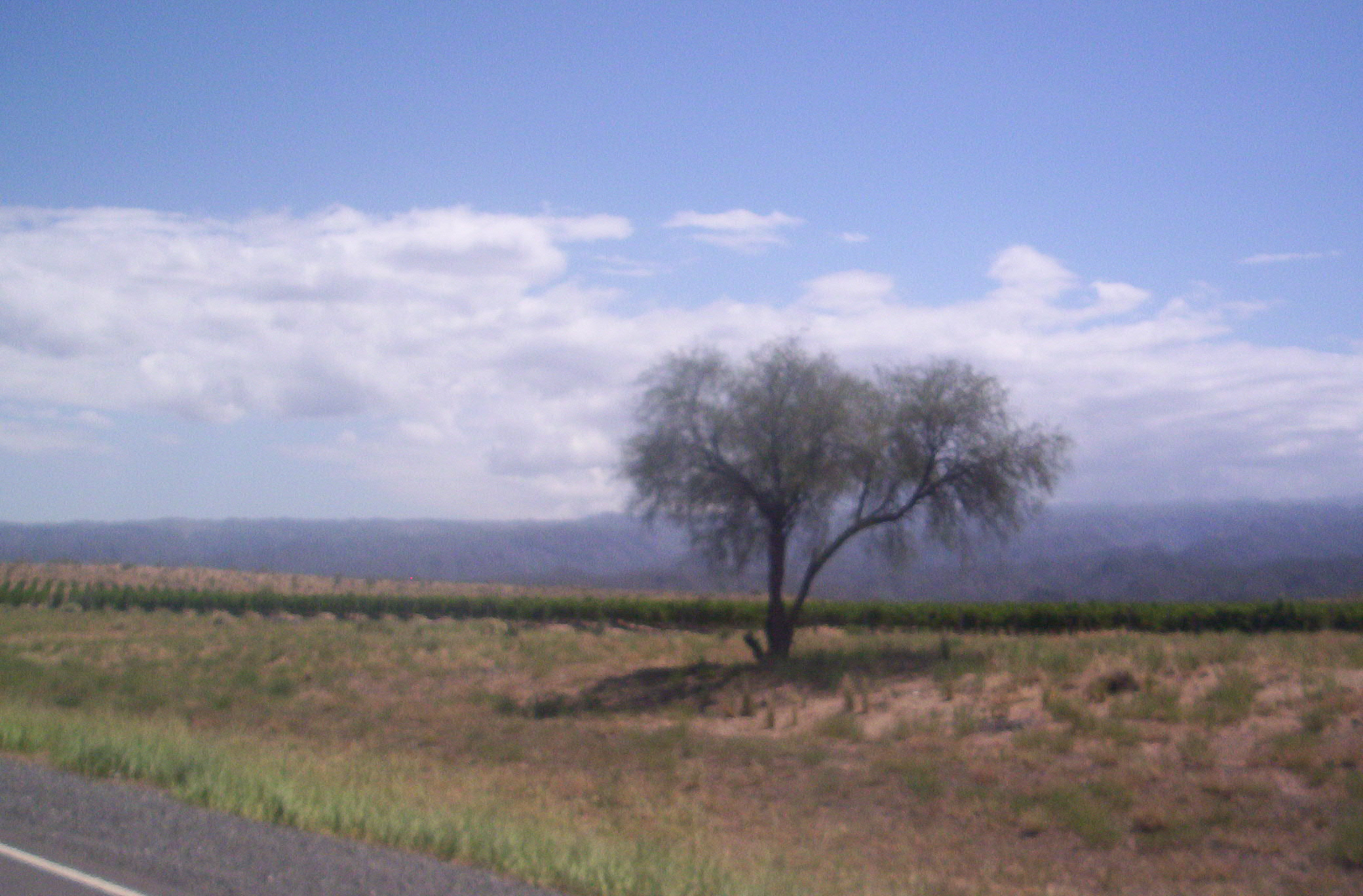 Vista del típico paisaje de la provincia de San Juan, Argentina